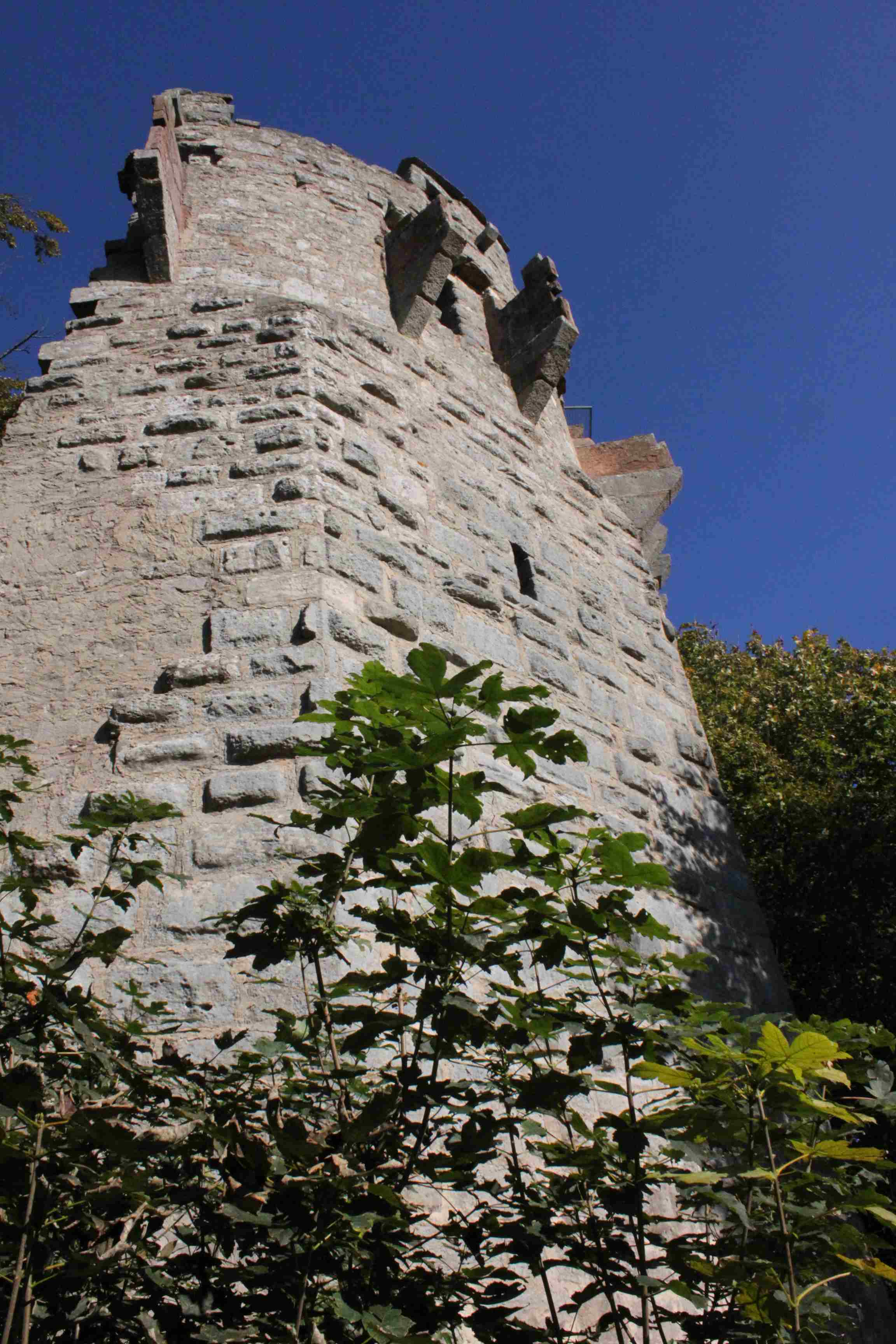 Burgruine Stollburg auf dem Stollberg. Die Burg soll der Geburtsort des Minnesängers Walther von der Vogelweide sein